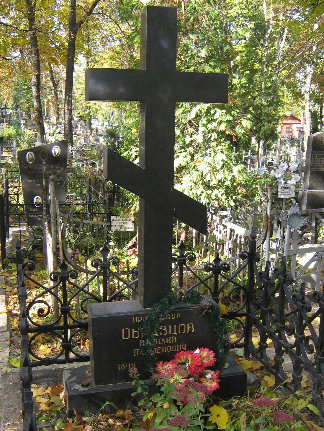 Могила Образцова В. П., професора, Київ, Дорогожицька вул. 7